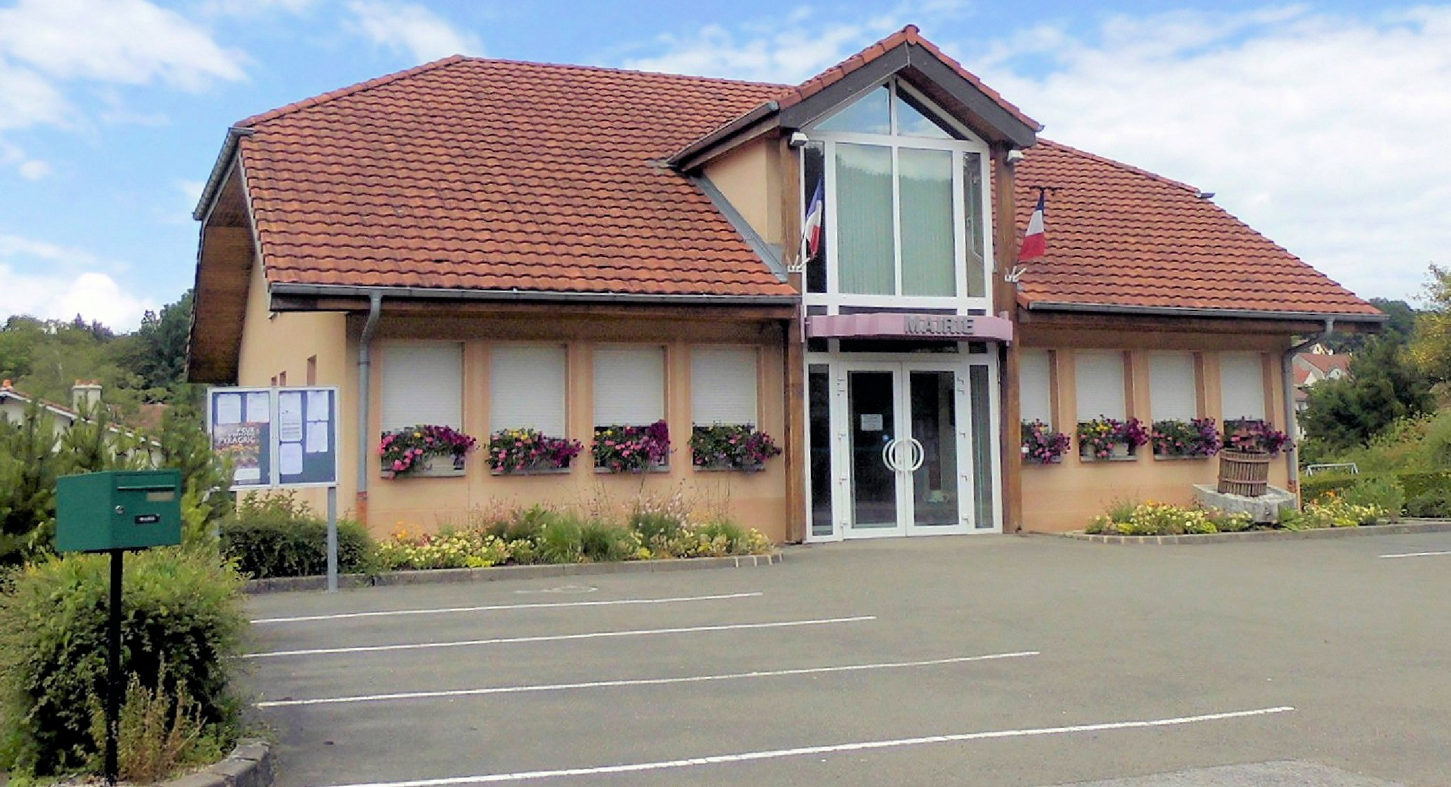 L'a mairie d'Étouvans